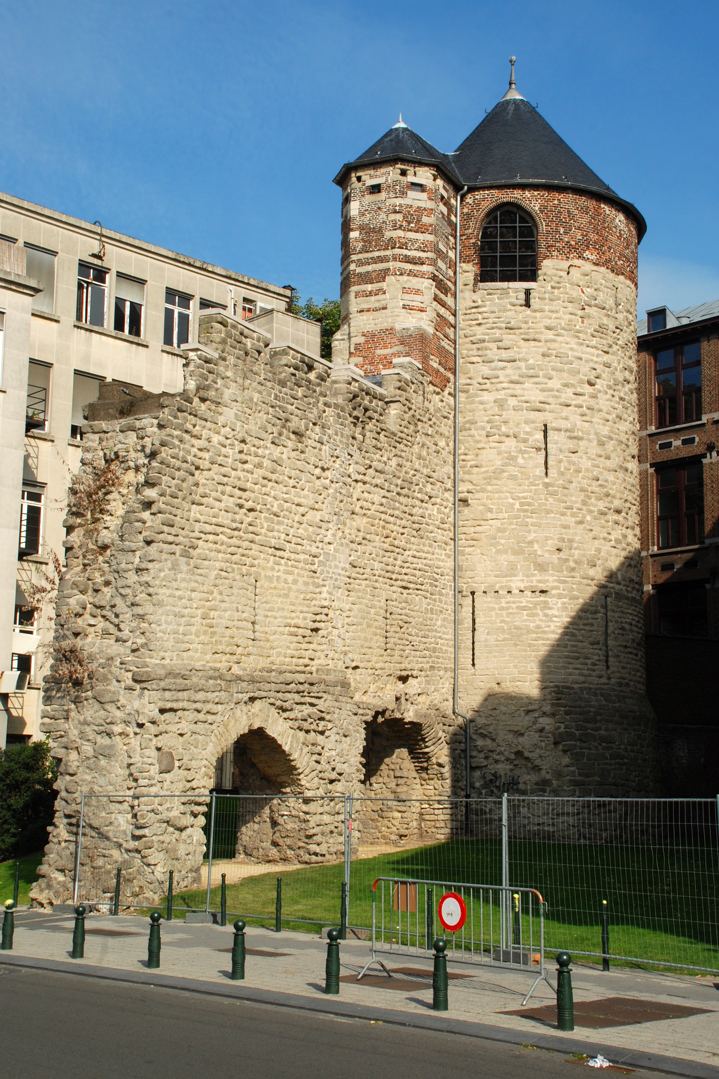 Belgique - Bruxelles - Tour Anneessens